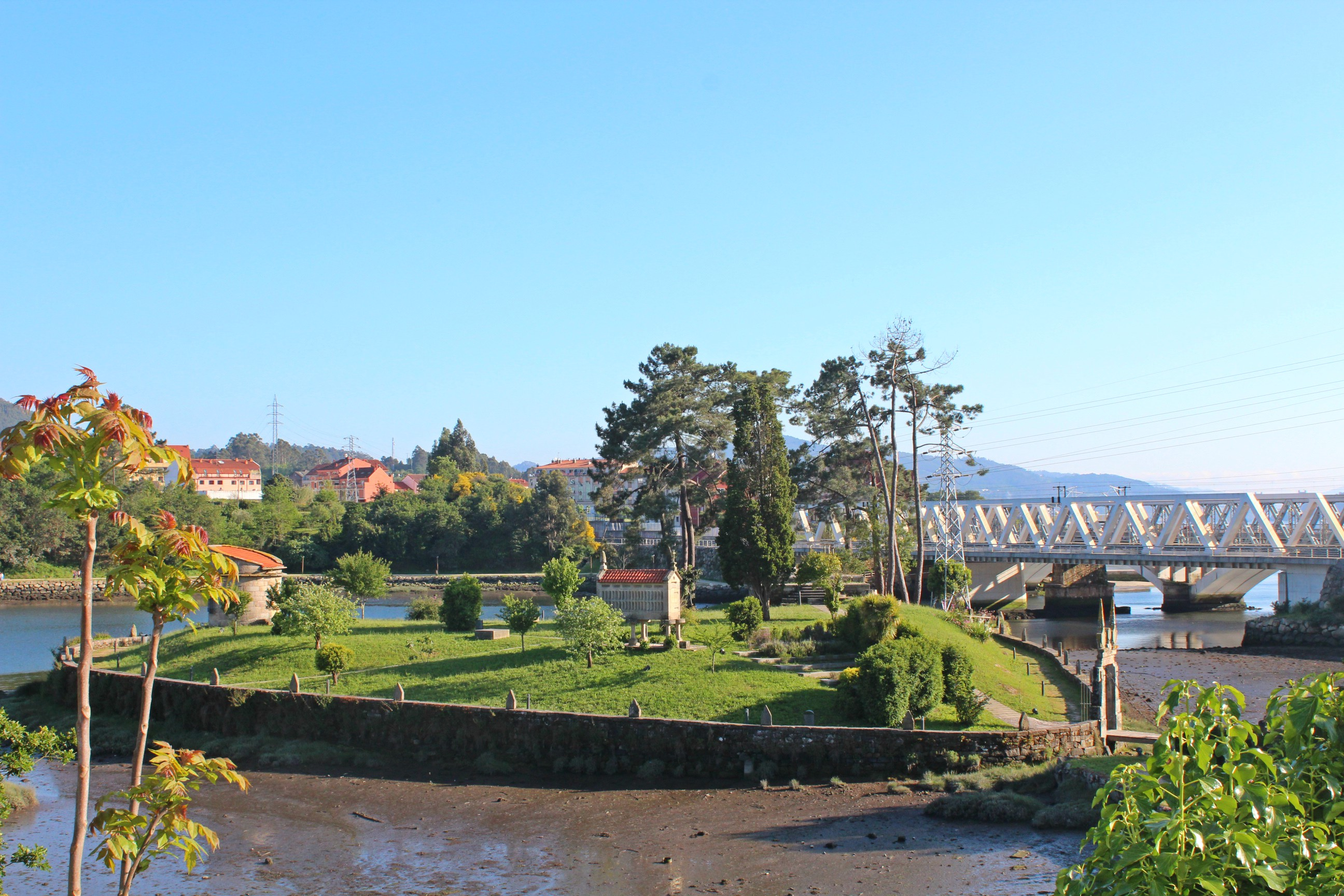 Illote.